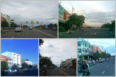 สภาพตัวอำเภอขุขันธ์